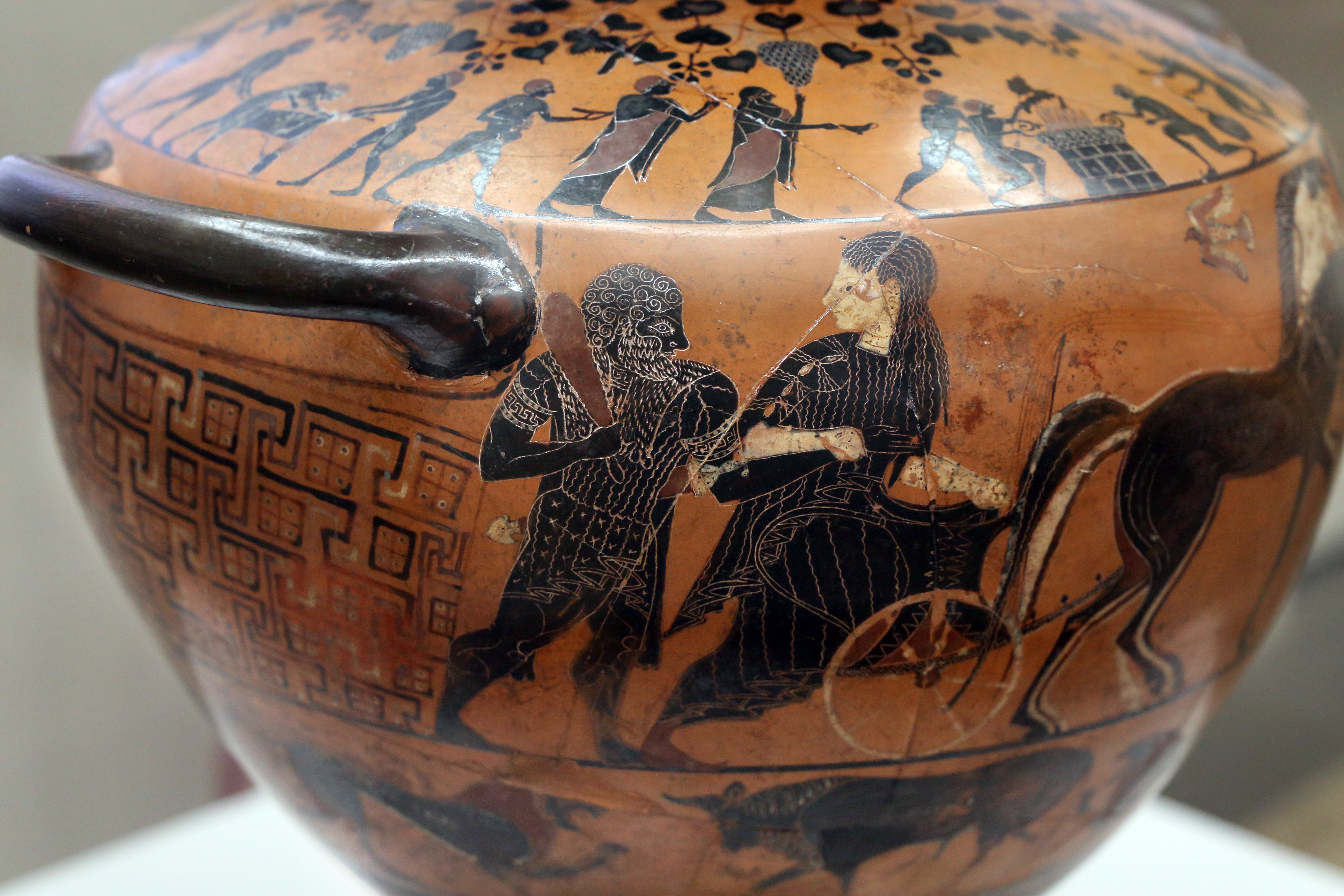 Villa Giulia (Rome) This is a photo of a monument which is part of cultural heritage of Italy.